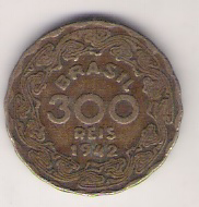 Uma moeda de 300 Réis cunhada em 1942. This PNG graphic was created with GIMP.